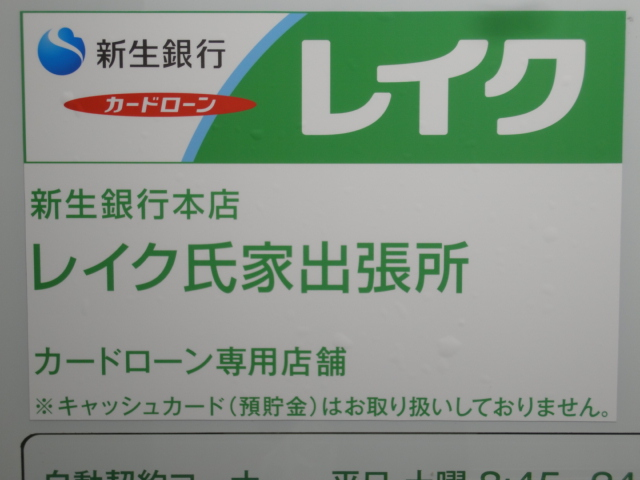 新生銀行本店レイク氏家出張所（旧新生フィナンシャル レイク氏家自動契約コーナー）店名標識 栃木県さくら市（旧氏家町）